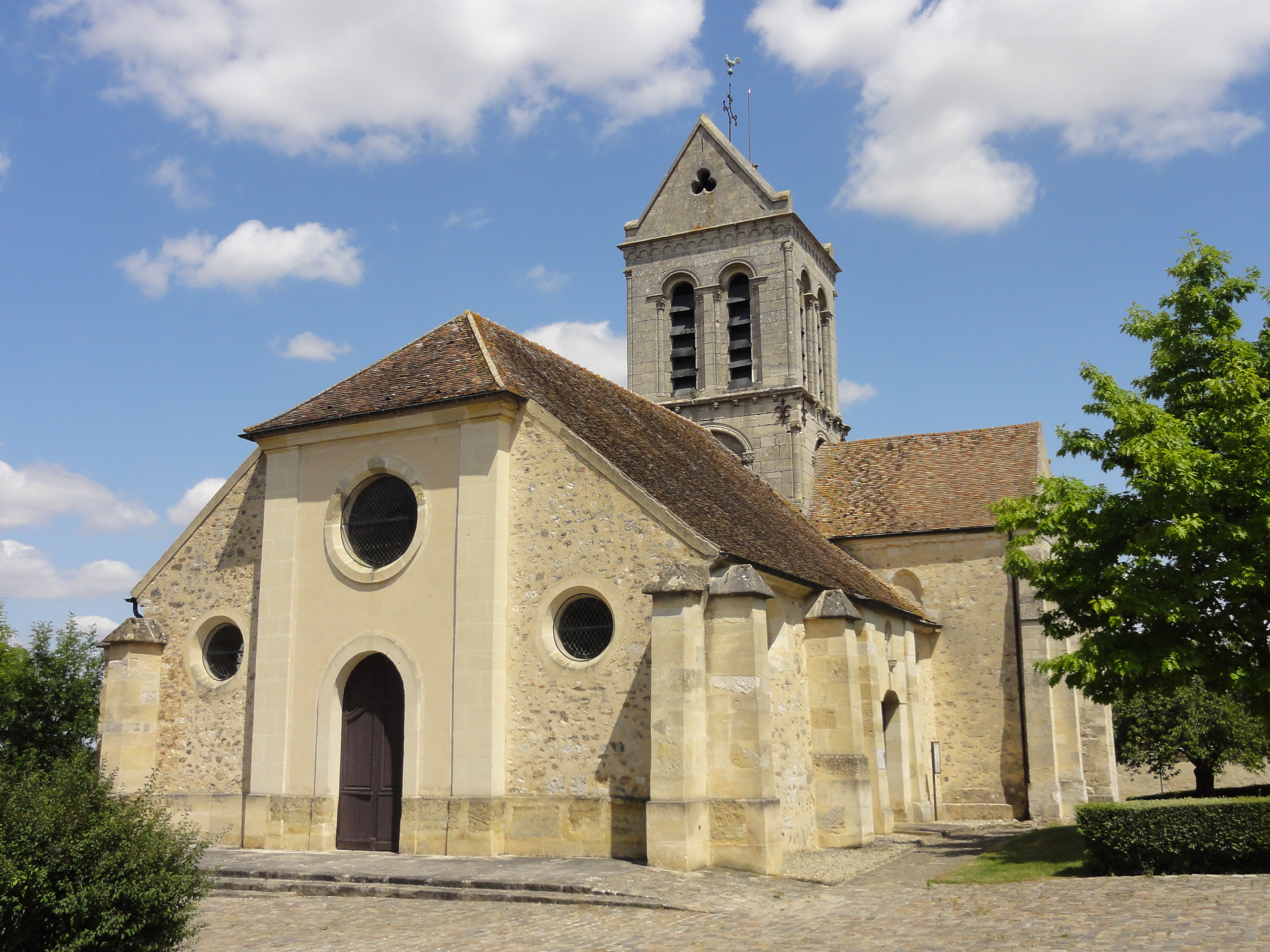 Voir titre.